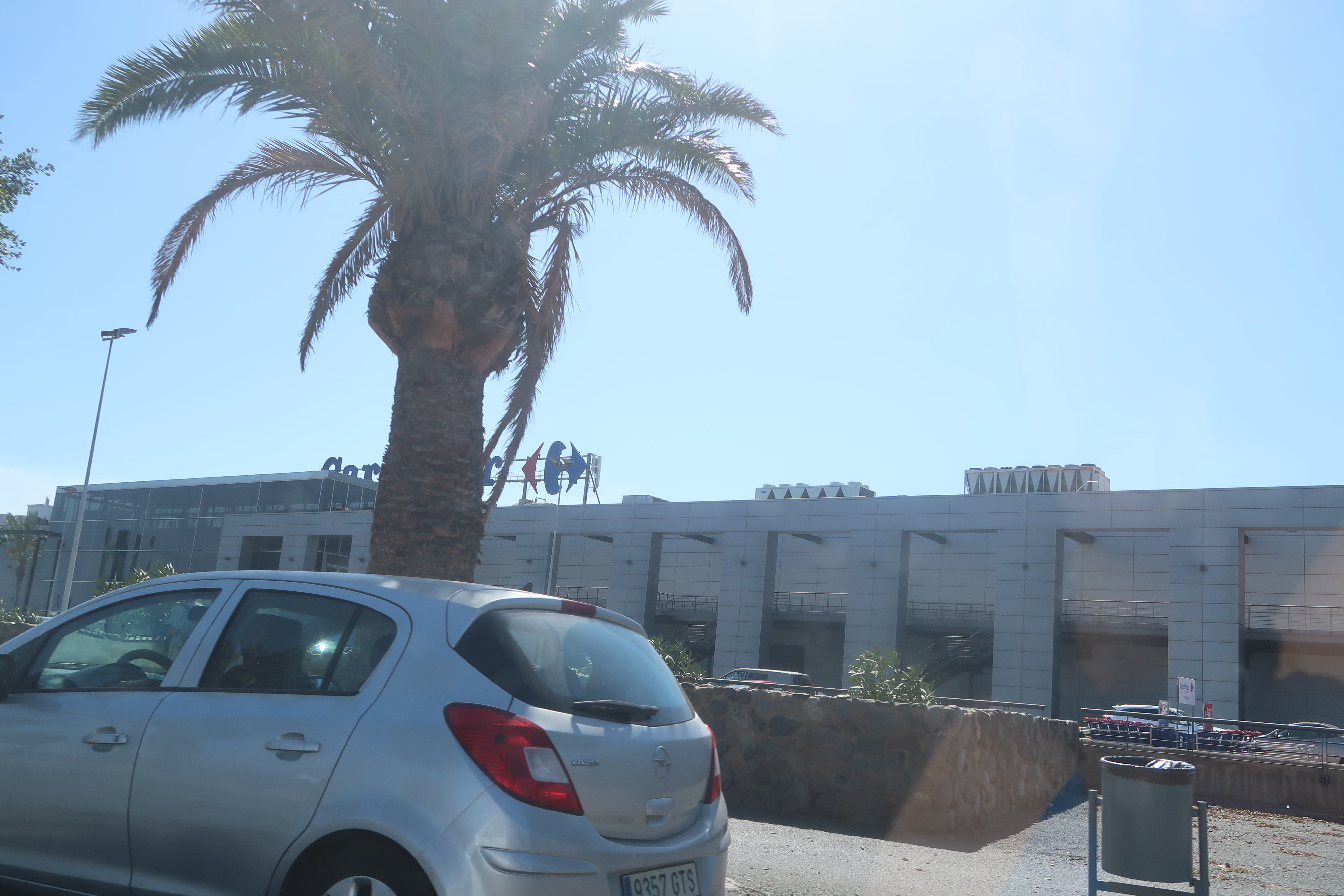 Vista del CC Atlántico Norte desde el noreste